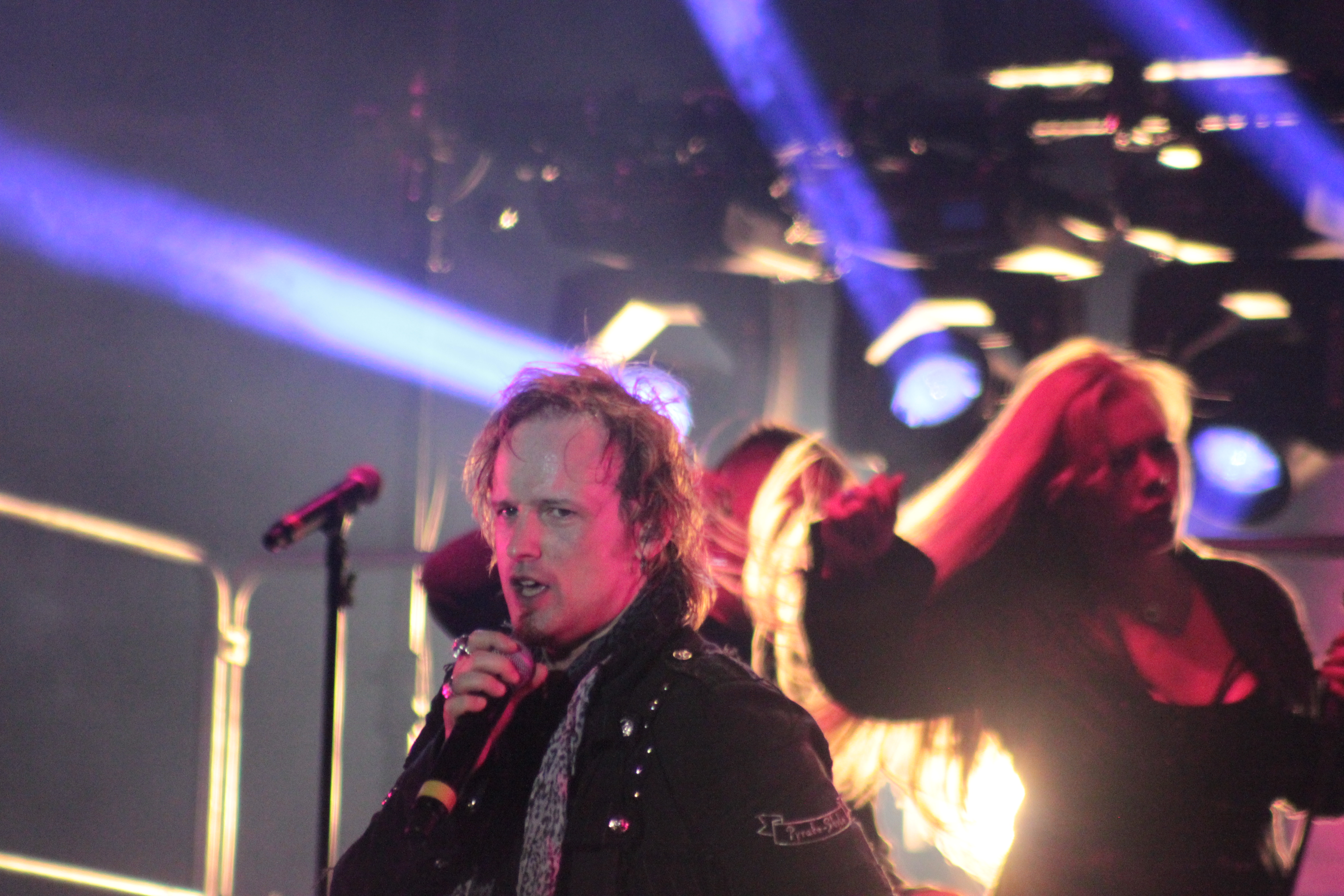 Avantasia, Helfest 2013, Fr-44-Clisson.